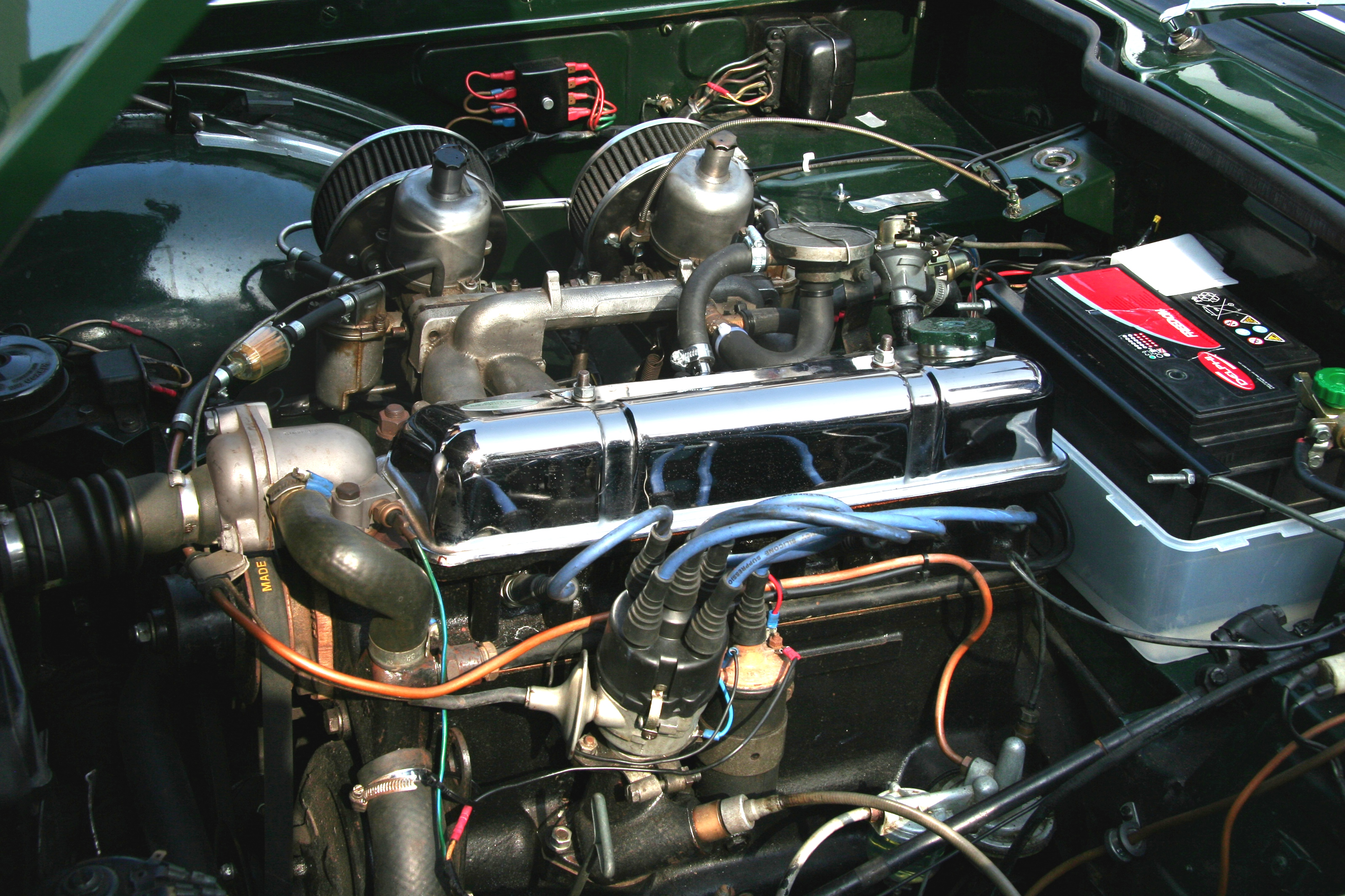 Motor eines Triumph TR 4A, gebaut von 1965 bis 1967